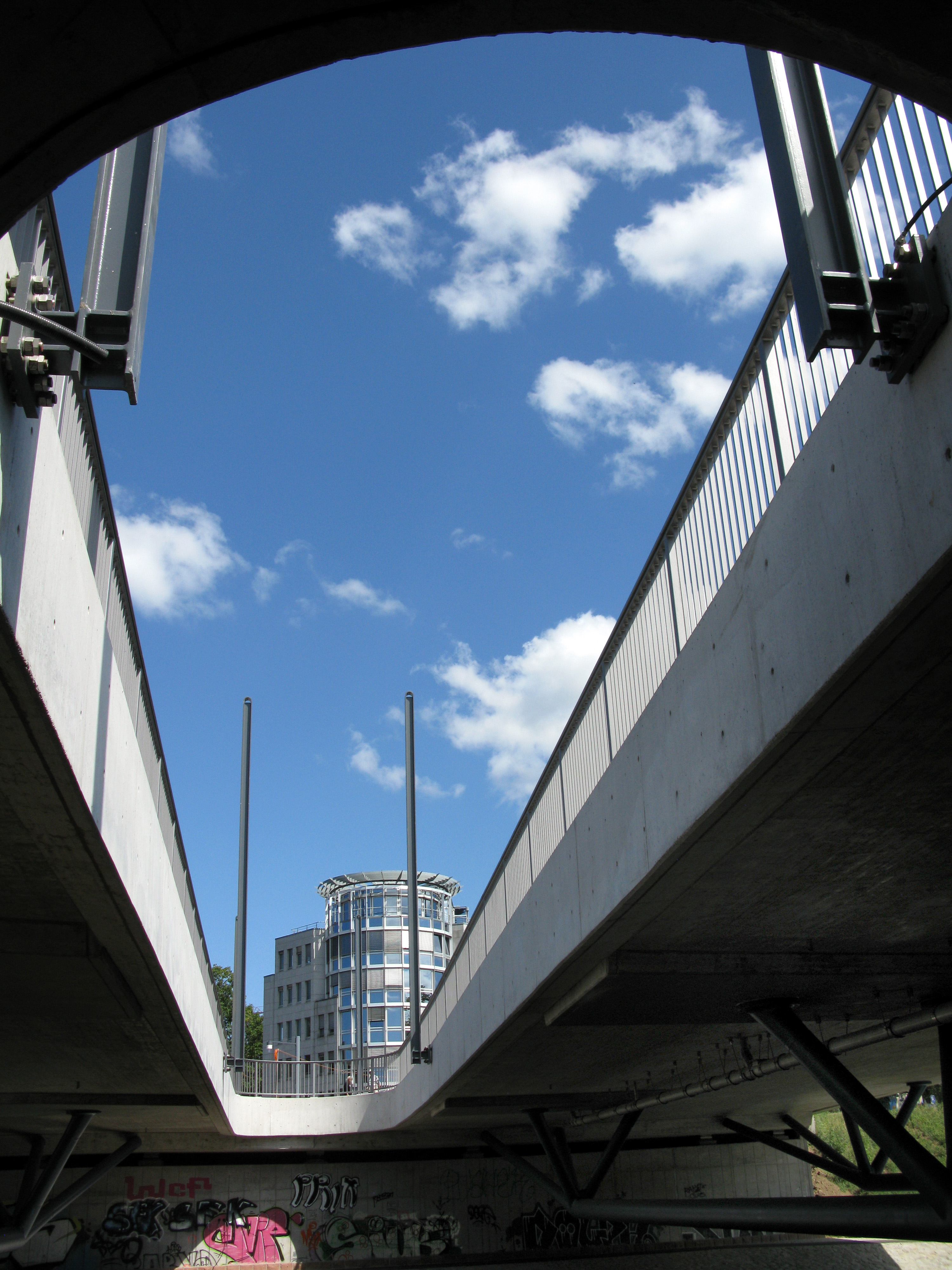 Neubau der Freiburger Kronenbrücke, die - im Vergleich zur alten Brücke - schmalere Lichtöffnung mit Fahrleitungsmasten